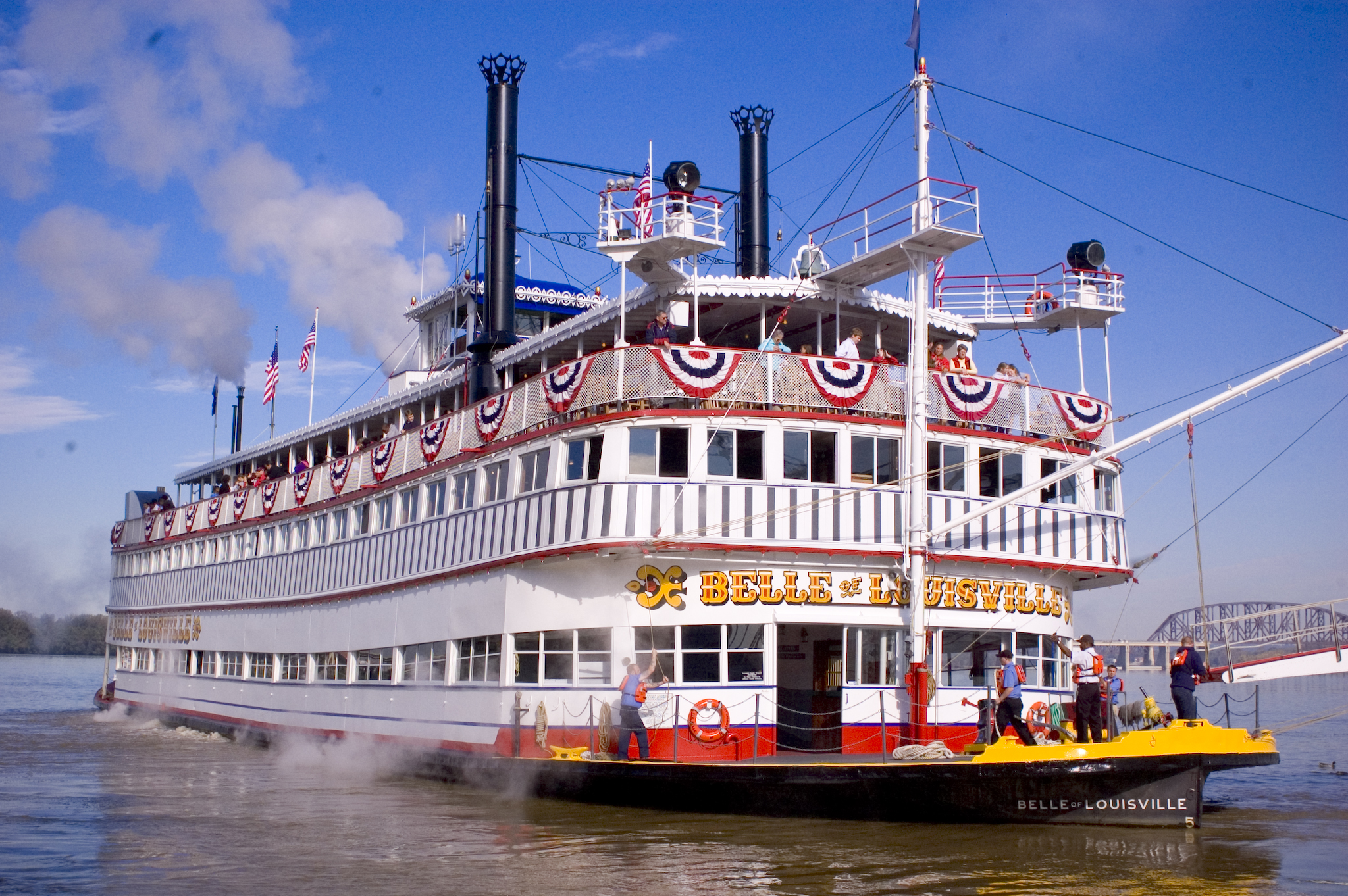 Belle of Louisville